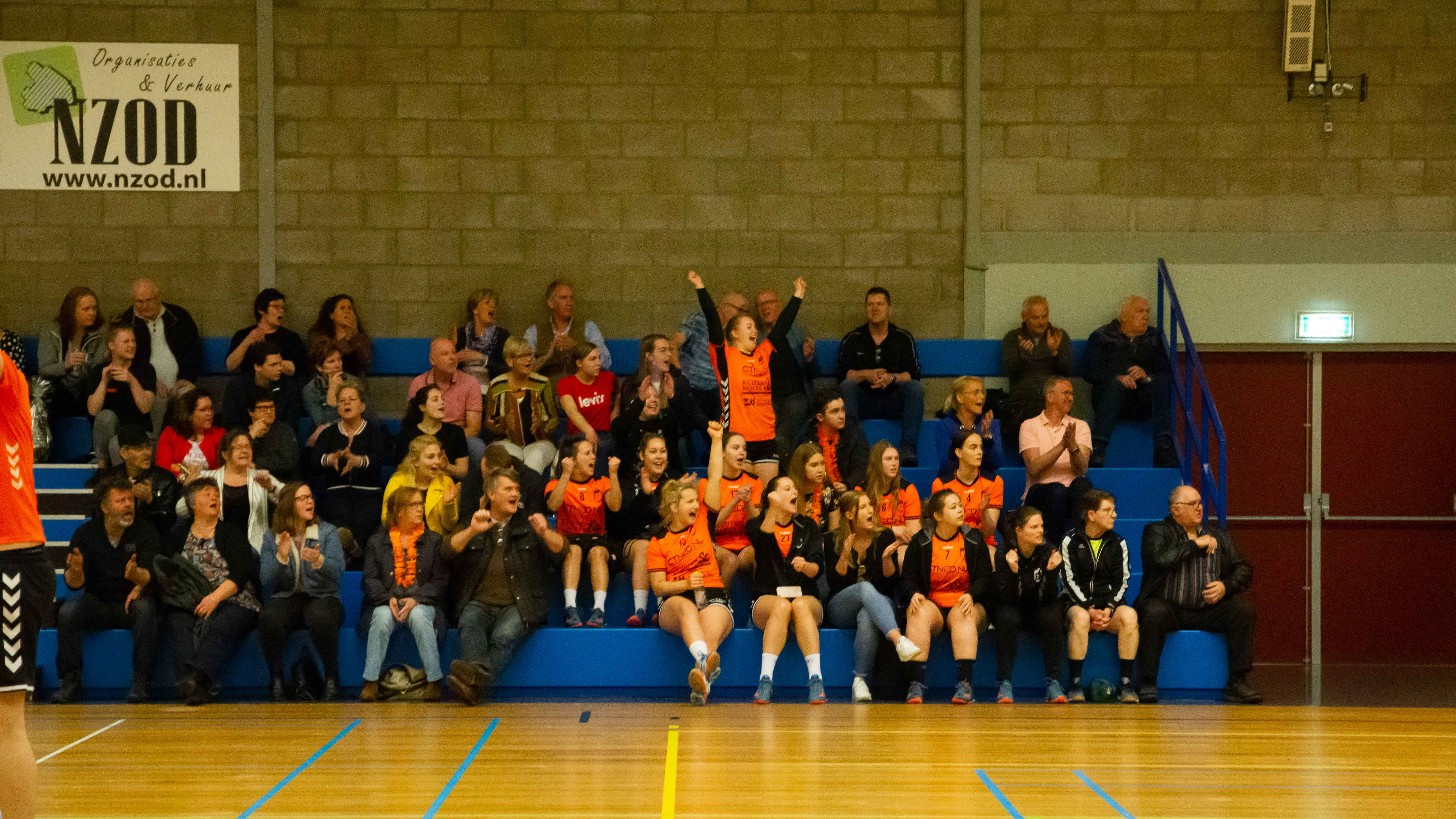 Volle tribunes bij HVC.